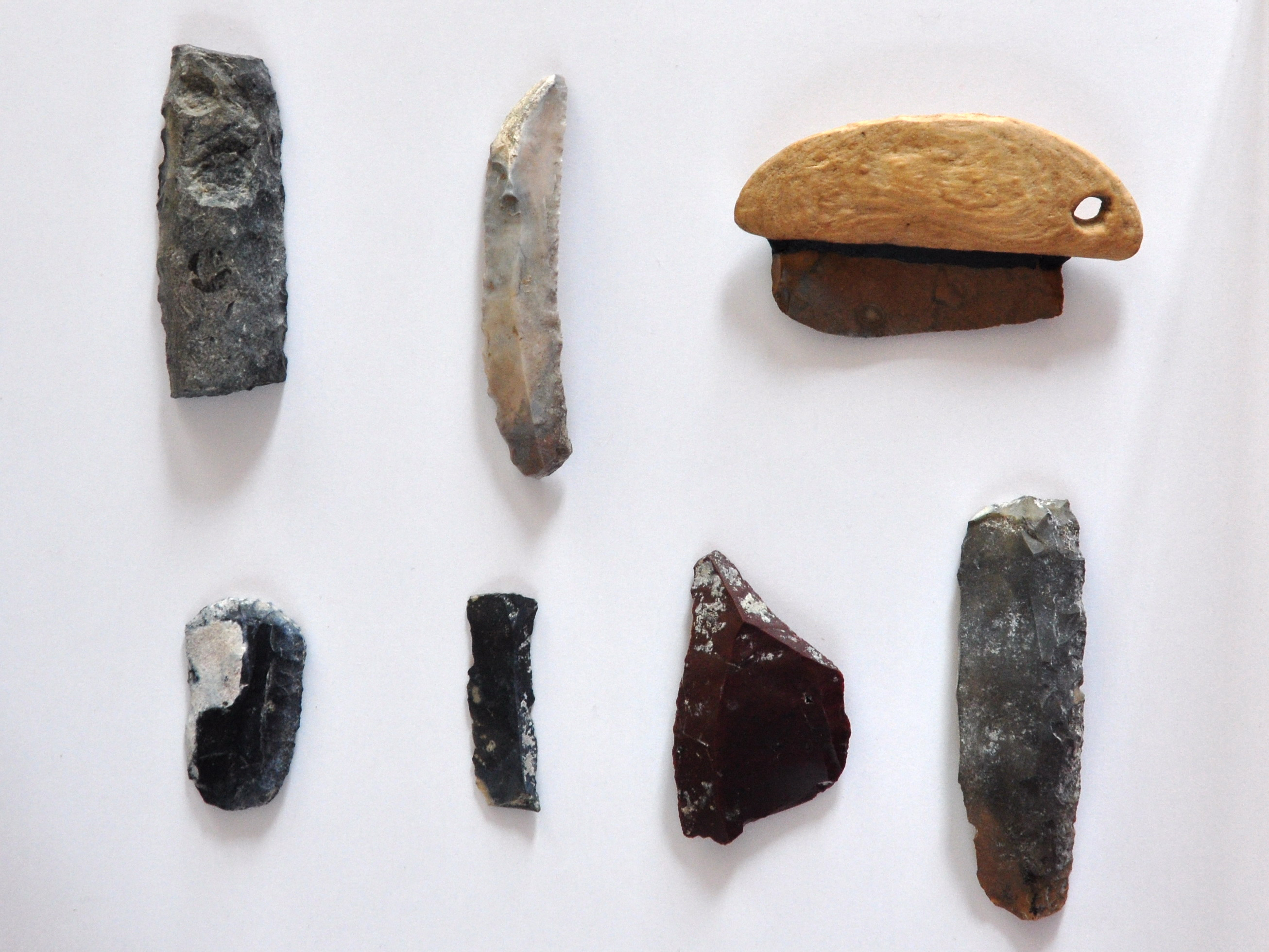 Fundstelle Seegubel (4. bis 3. Jahrtausend v.Chr.) in Kempraten (Switzerland) : Aussergewöhnlich sind Überreste der Steinbeilherstellung, darunter Abschläge, Stücke mit Sägeschnitten, Halbfabrikate und fertige Klingen, welche den Herstellungsprozesse aufzeigen. Zu den häufigsten Materialen gehören Grüngesteine und Serpentinite sowie Silex (Feuerstein) für Messer und Pfeilspitzen.